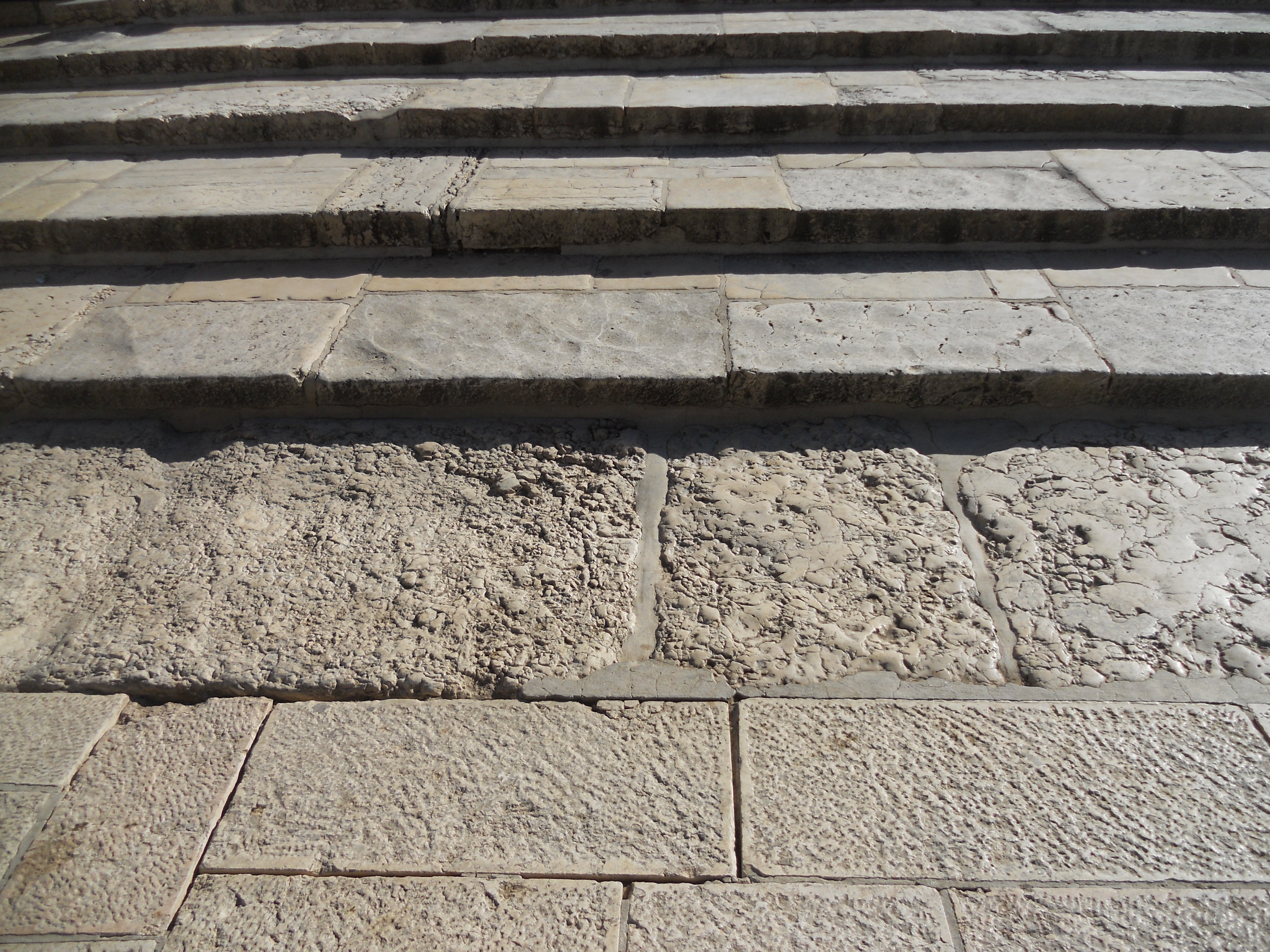 המדרגות האלה נמצאות בצד המערבי של ה"רמה" בהר הבית בירושלים, יש דעות שהמדרגה התחתונה היא שרידים מה"חיל" שהוא חומה סביב העזרה. צולם בניסן תשע"ב 2012